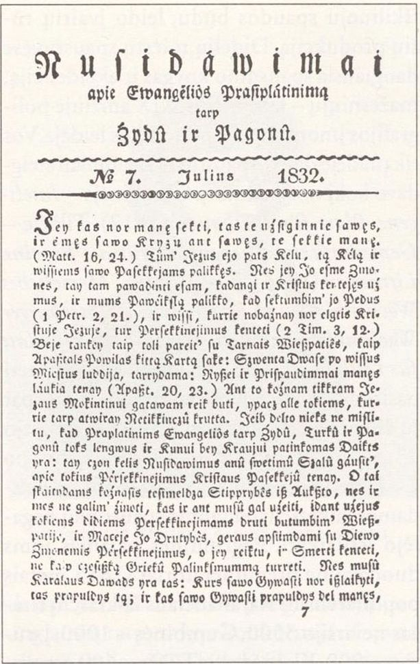 First page of Nusidavimai apie evangelijos prasiplatinimą tarp žydų ir pagonių (volume 7, 1832)